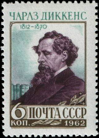 Английский писатель Чарлз Диккенс (1812-1870). К 150-летию со дня рождения. Почтовая марка СССР 1962г.